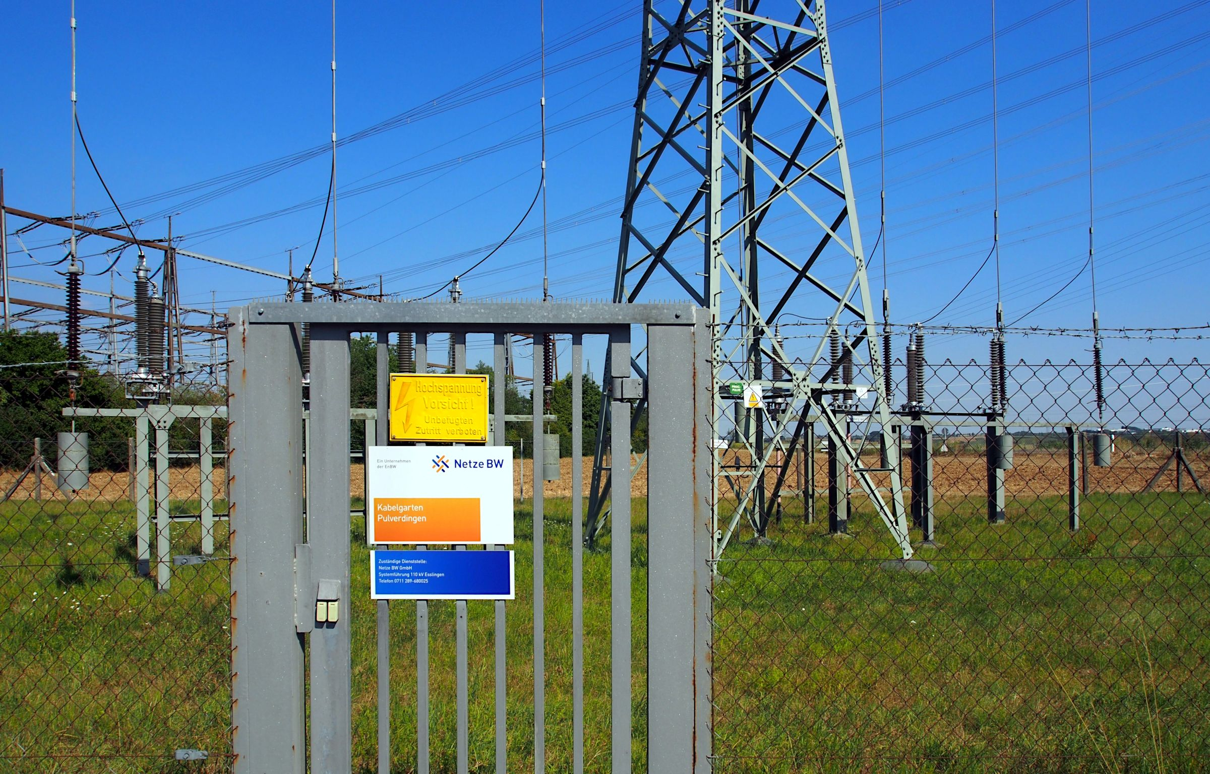 Kabelgarten Pulverdingen